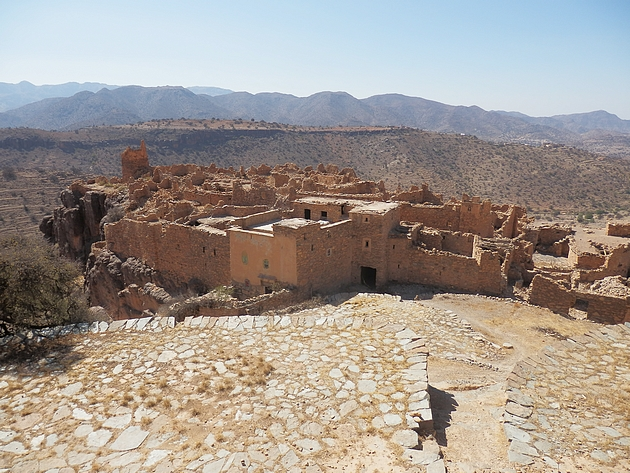 Im Vordergrund die zum Ksar gehörenden, terrassenförmig angelegten Dreschplätze.